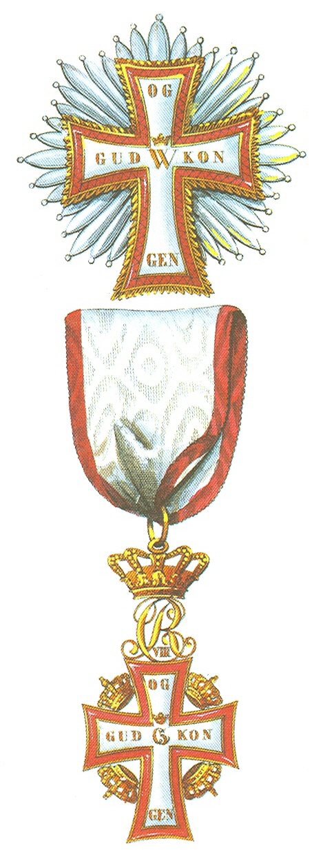 Orde van de Dannebrog (Denemarken).